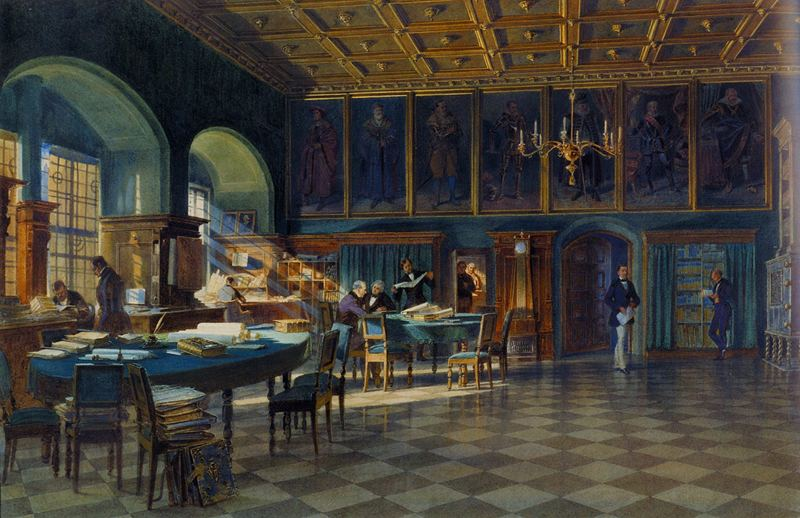 Die Ratsstube im Alten Rathaus Leipzig, Aquarell von Carl Werner